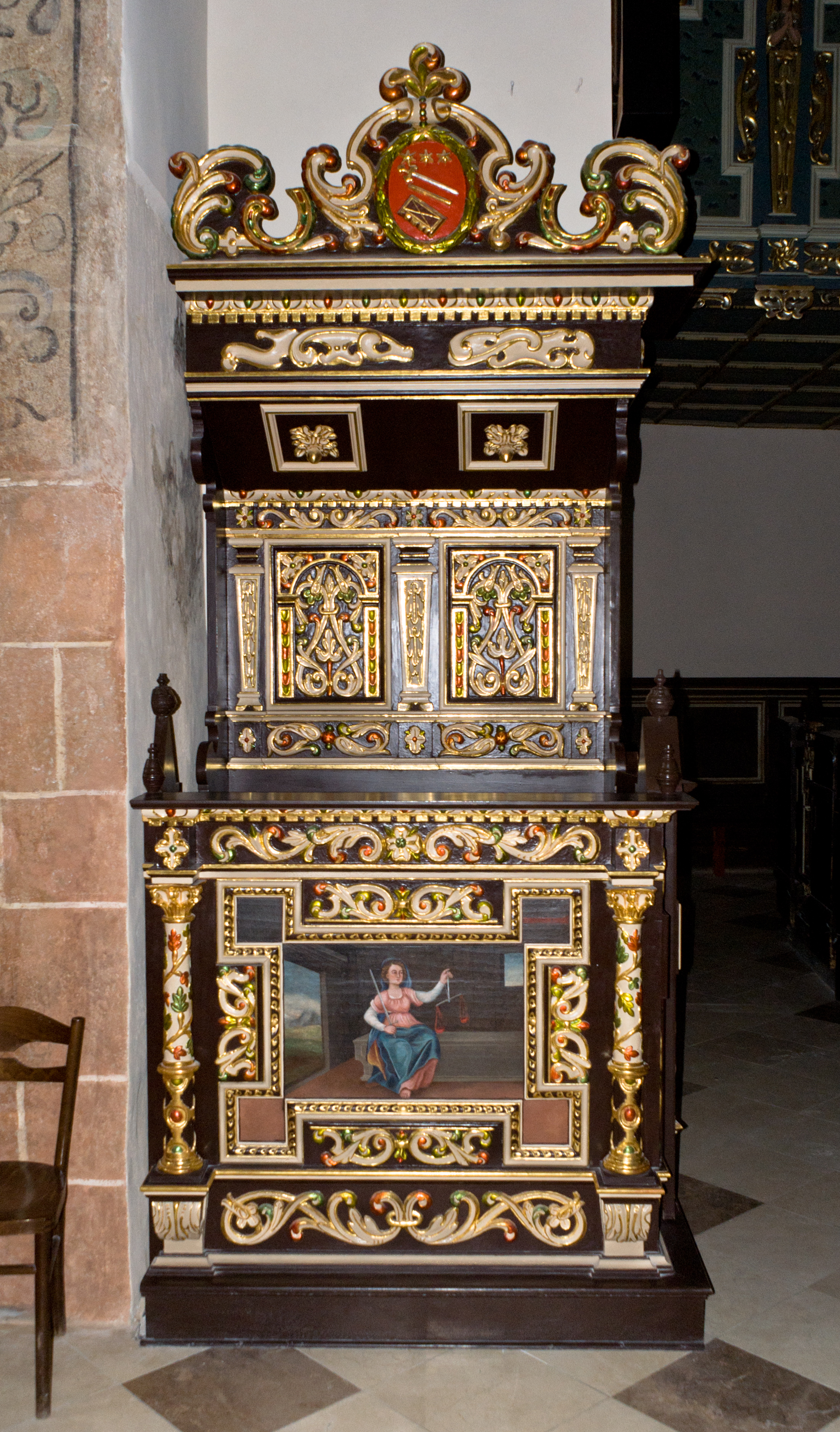 Ławka Anny i Roberta Portiusów, wnętrze kościóła farnego pw. Świętej Trójcy w Krośnie